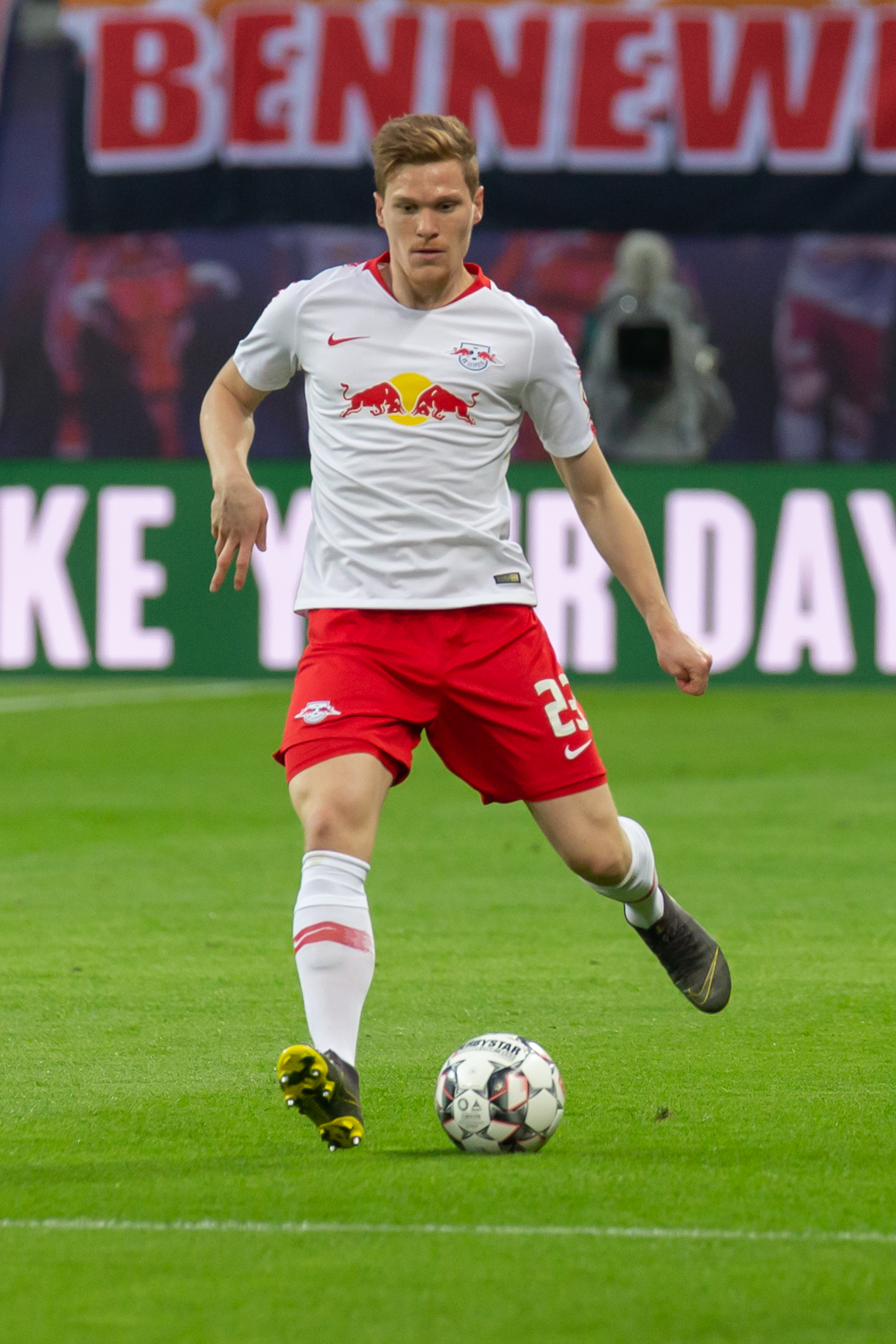 Fußball, Männer, 1. Bundesliga, RB Leipzig - Hertha BSC; Marcel Halstenberg (RB Leipzig, 23); Freisteller, Einzelbild, Aktion, action